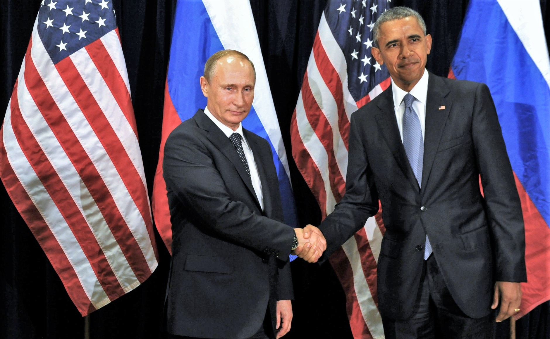 Президент России Владимир Путин с Президентом США Бараком Обамой